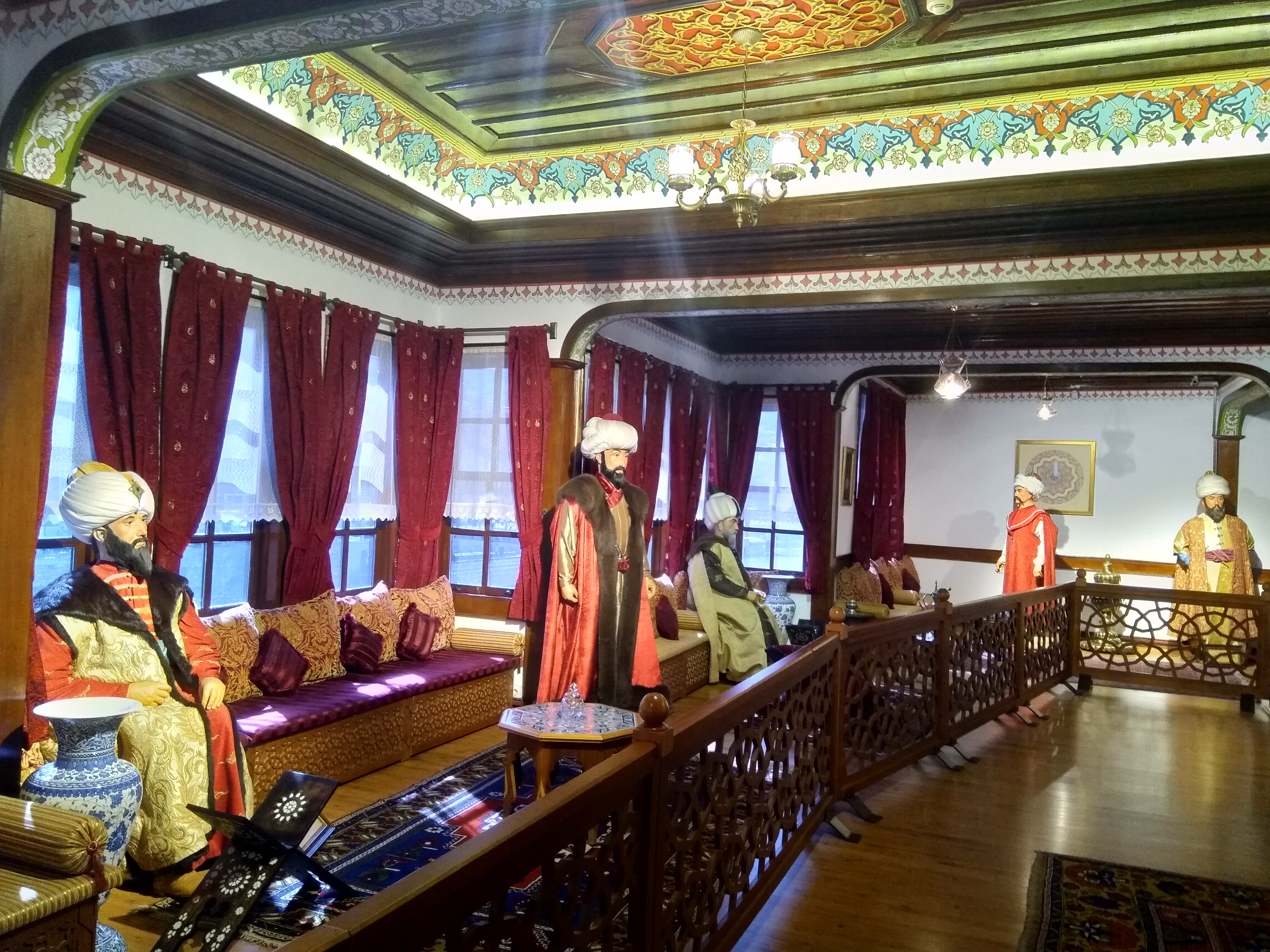 Amasya'daki Şehzadeler Müzesinde sergilenen balmumu heykellerden bir görünüm.